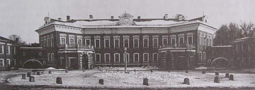 Дворец в усадьбе "Отрада"